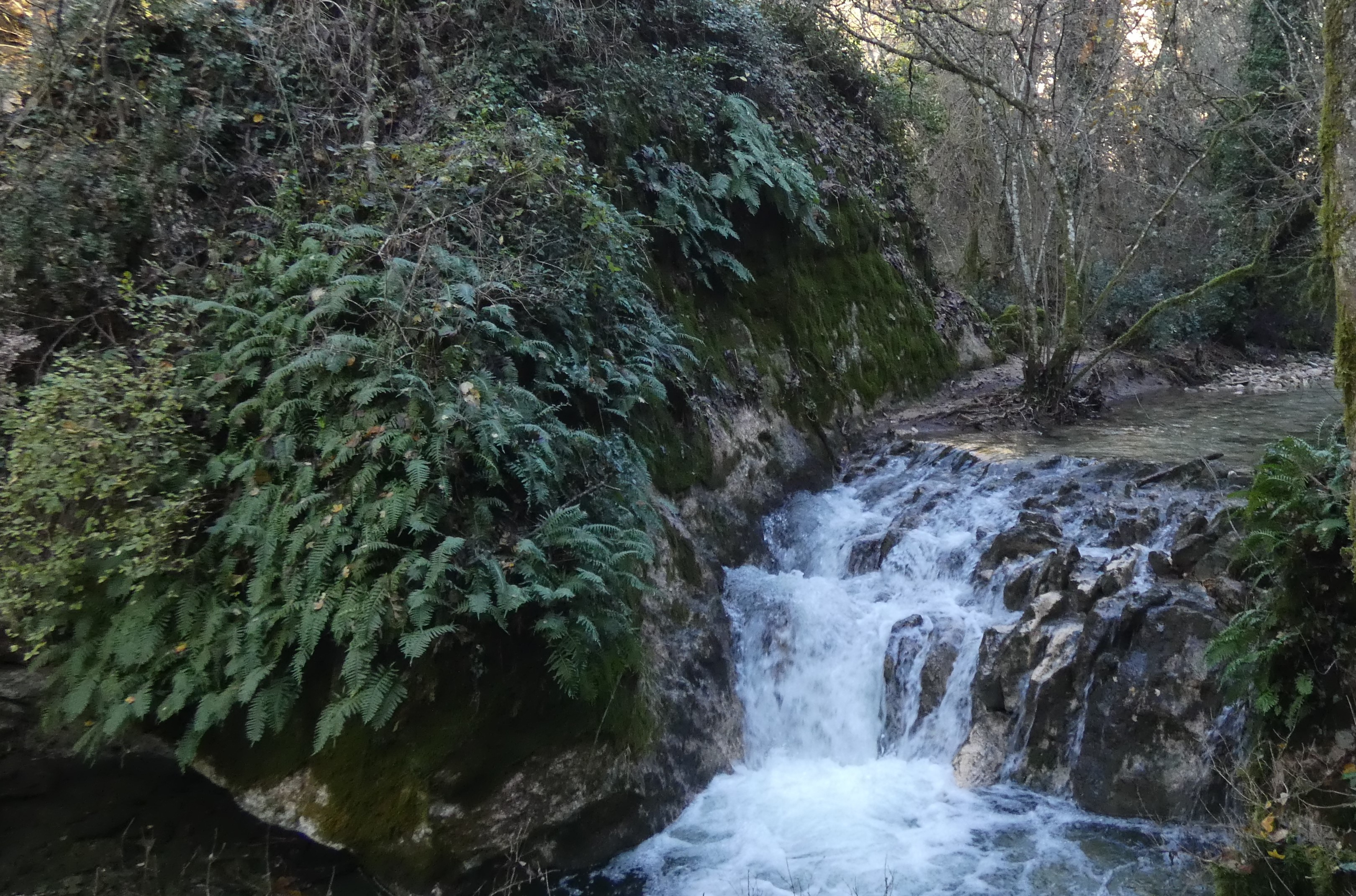 Aigue Brun partie Sivergues après de fortes pluies en décembre 2019